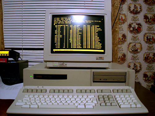 Sandpiper45 a.k.a. DEC 3000 Model 700 Server